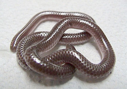 Leptotyphlops dulcis